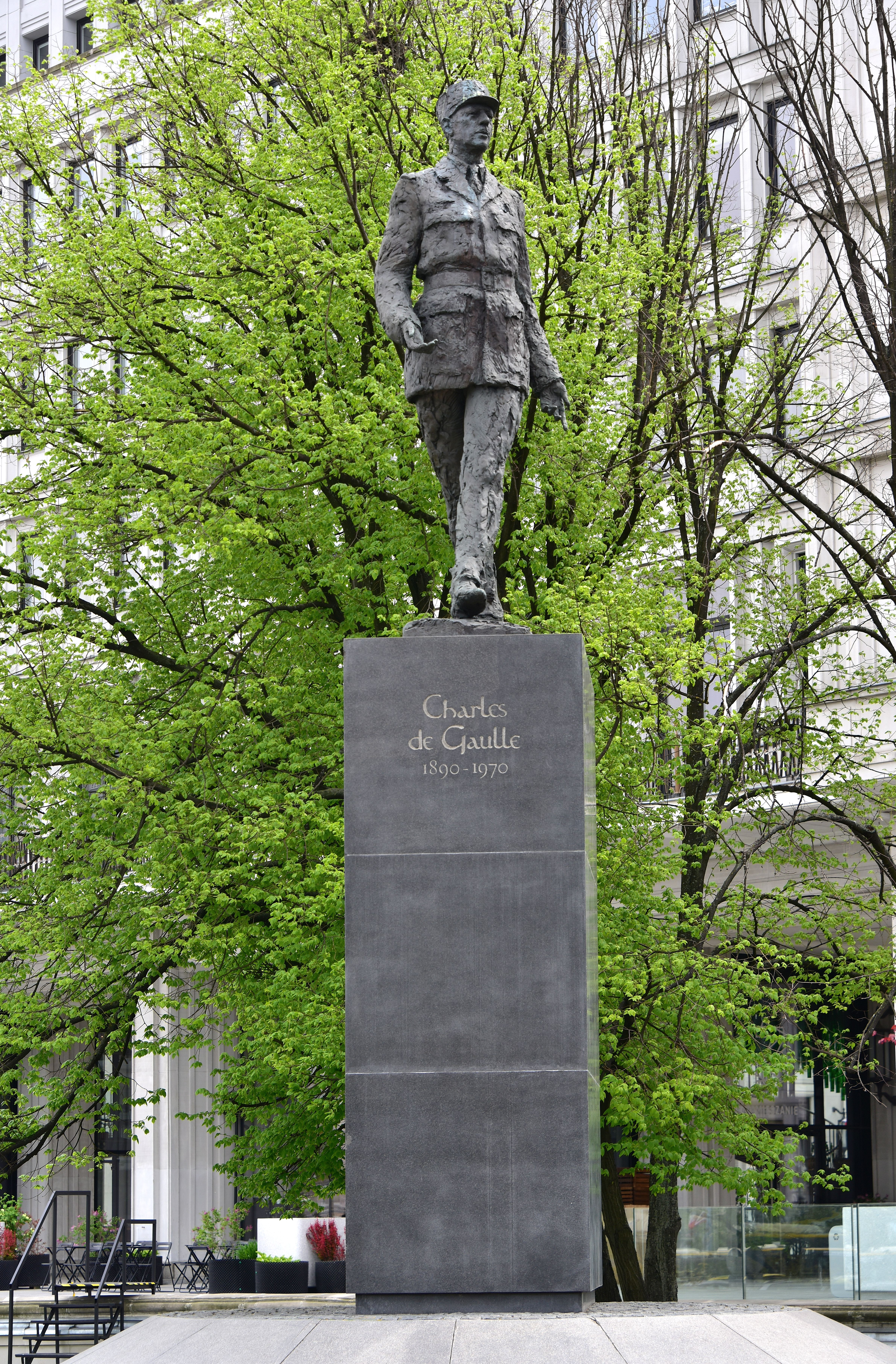 Pomnik Charles’a de Gaulle’a w Warszawie